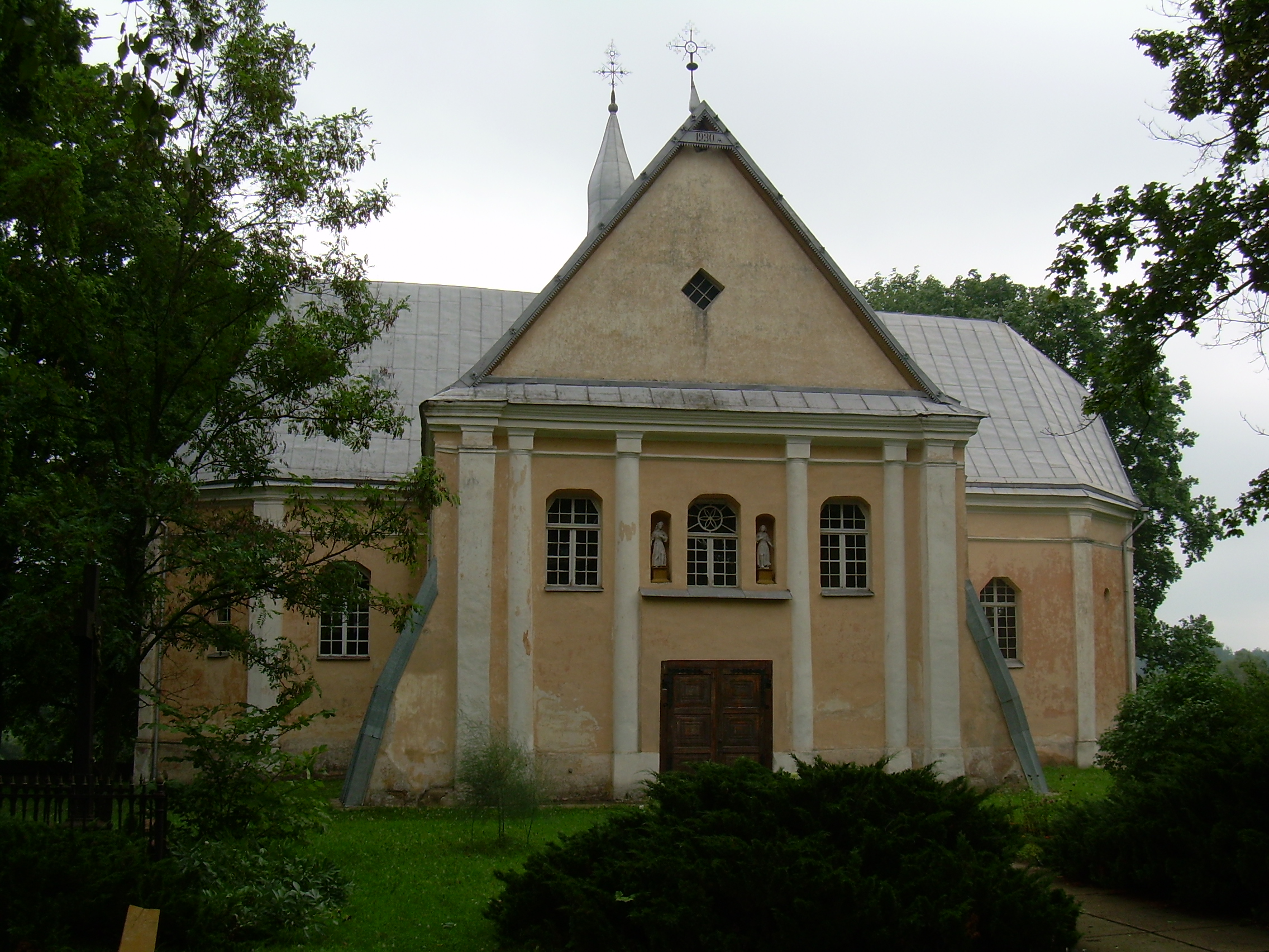 Pašušvio Visų Šventųjų bažnyčia